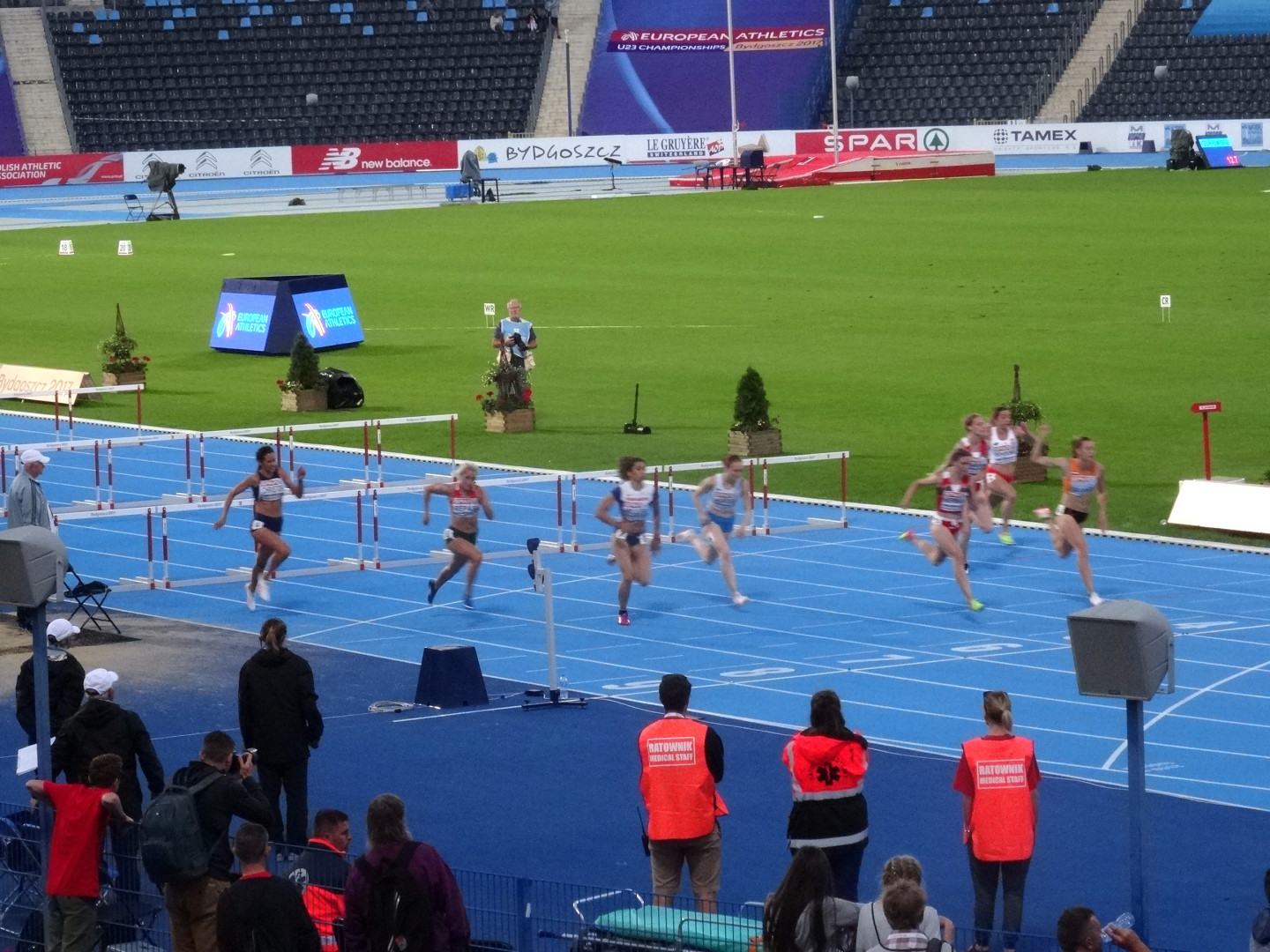 Młodzieżowe Mistrzostwa Europy w Lekkoatletyce U23 w Bydgoszczy 13-16 lipca 2017, półfinał biegu na 100 m przez płotki kobiet